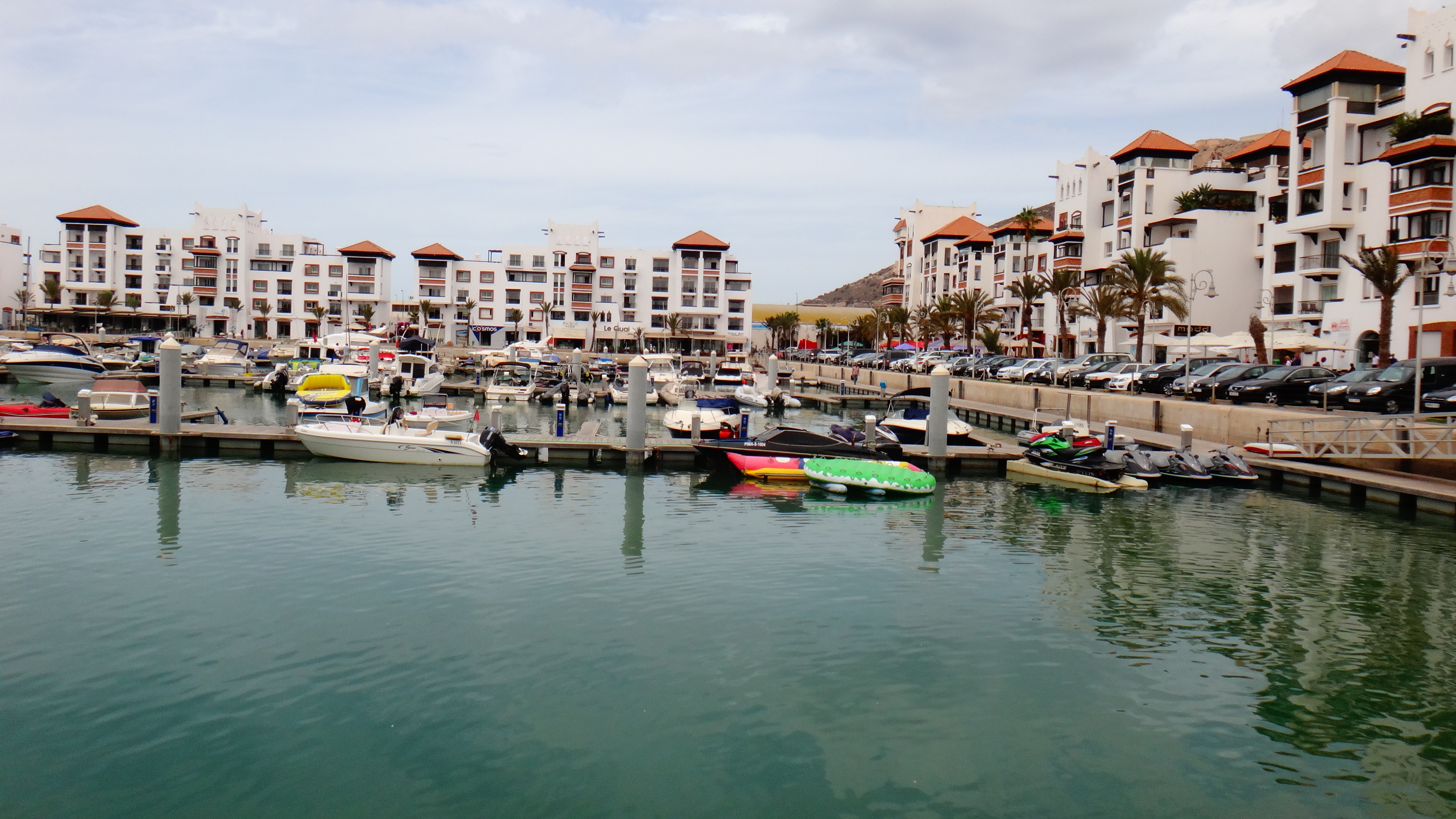 Secteur Touristique, Agadir 80000, Morocco